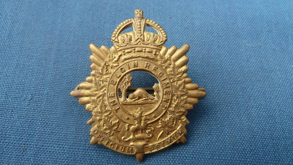 Cap badge gevonden in een blikken doos behorende aan mijn vader. Alle Cad badges horen bij de familie Byrne.